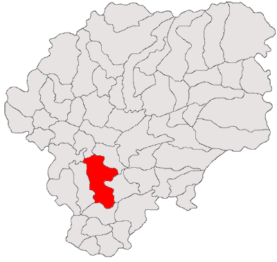 Categorie:Hărţi ale judeţului Bistriţa-Năsăud